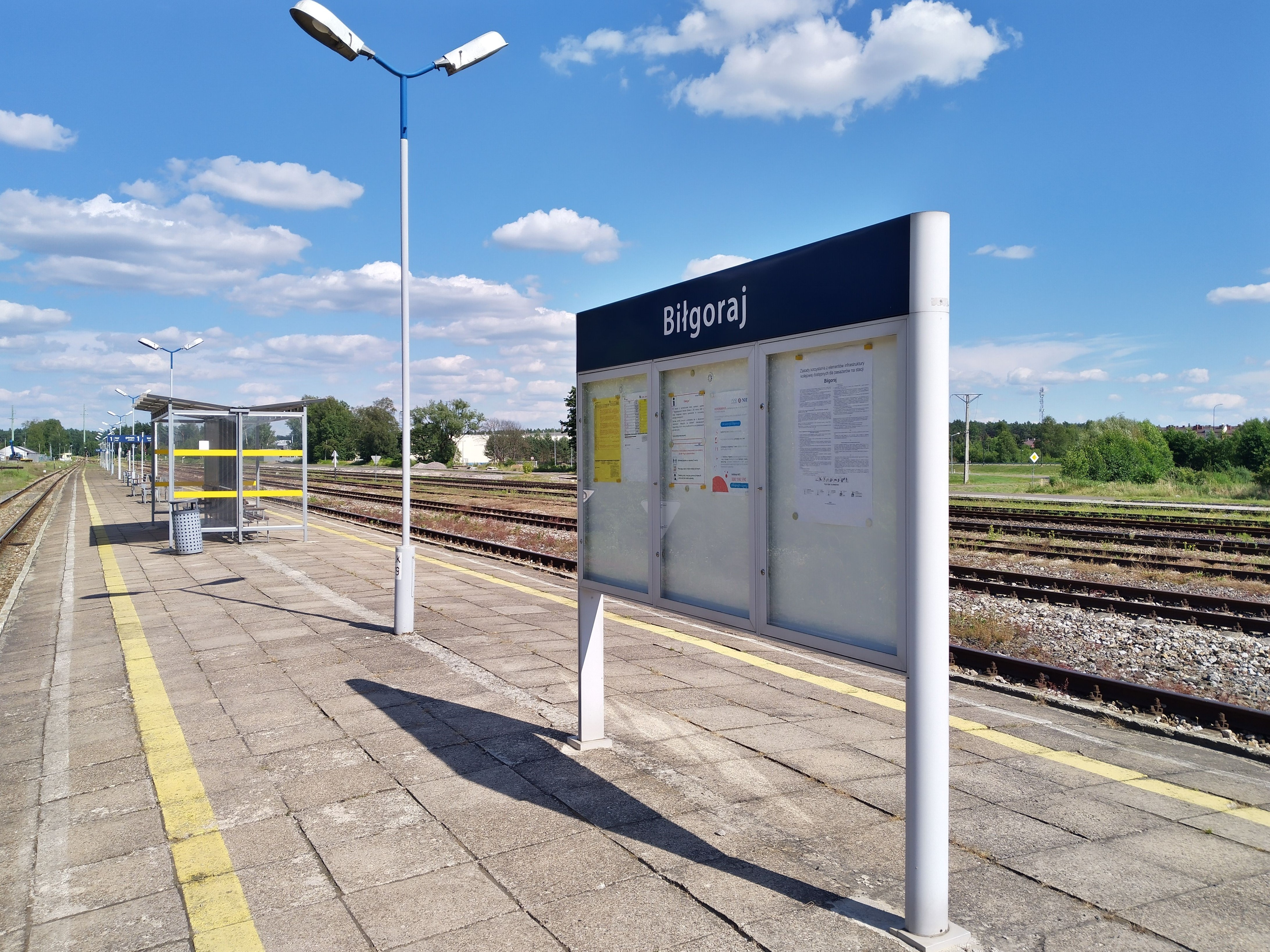 Peron 1 na stacji kolejowej Biłgoraj.